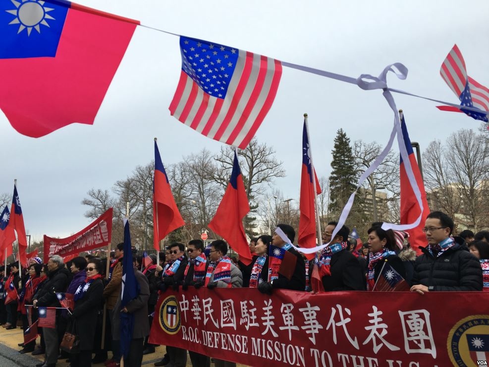 中文（台灣）: 2016年元旦升旗儀式